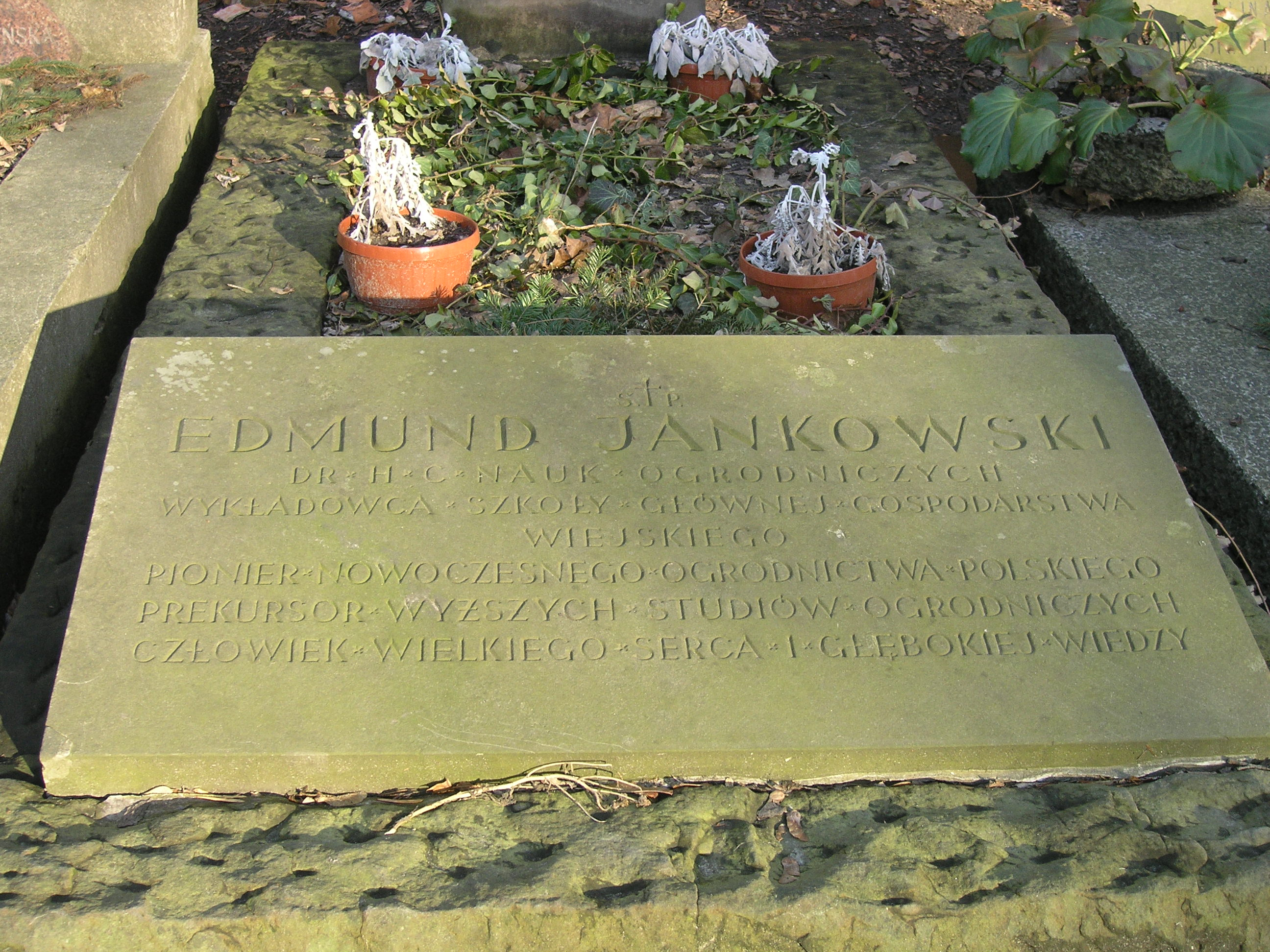 Grób biologa i ogrodnika Edmund Jankowskina Starych Powązkach w Warszawie (stan na marzec 2012)